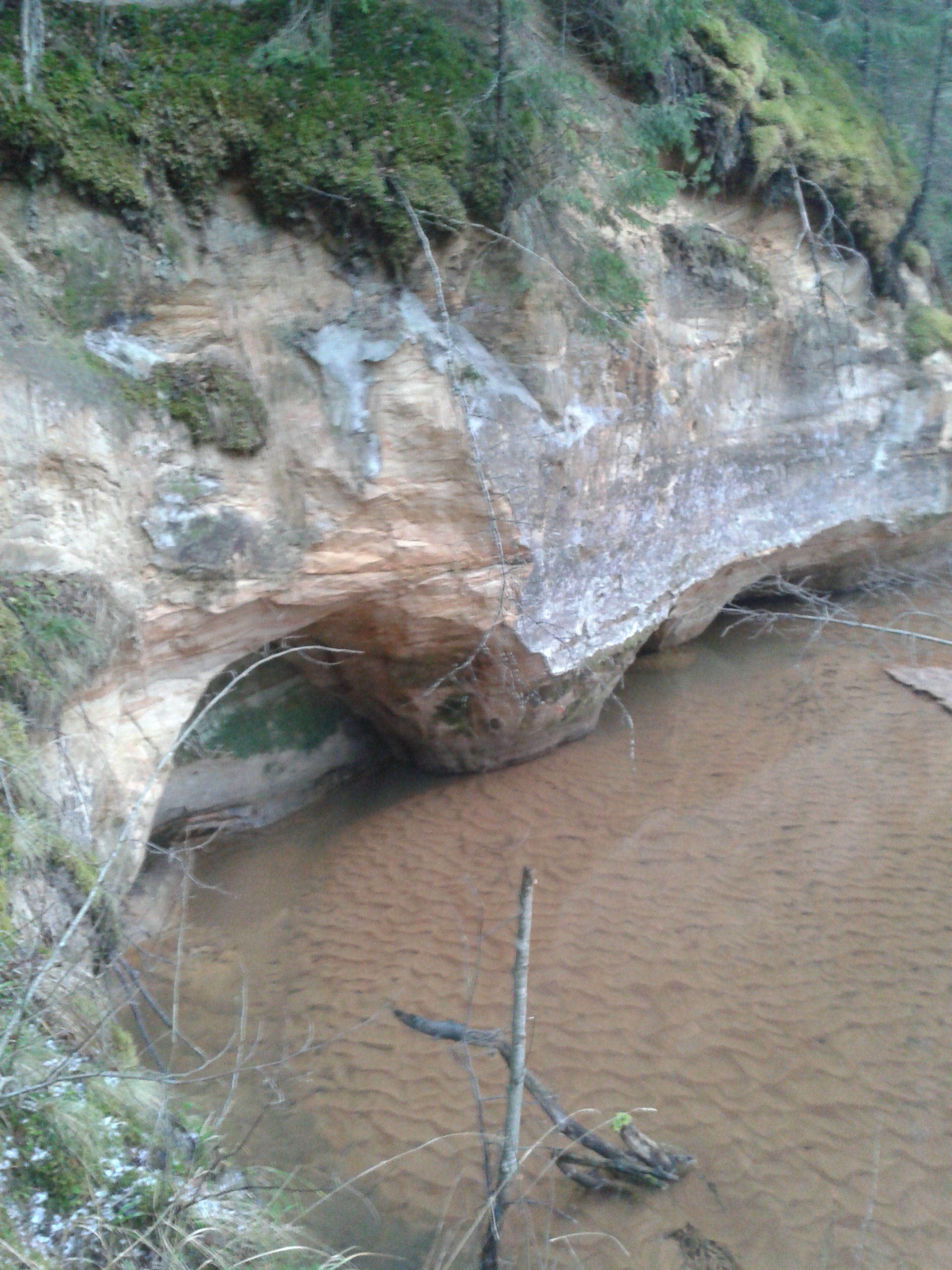 Tuhkvitsa oja liivakivi paljandid